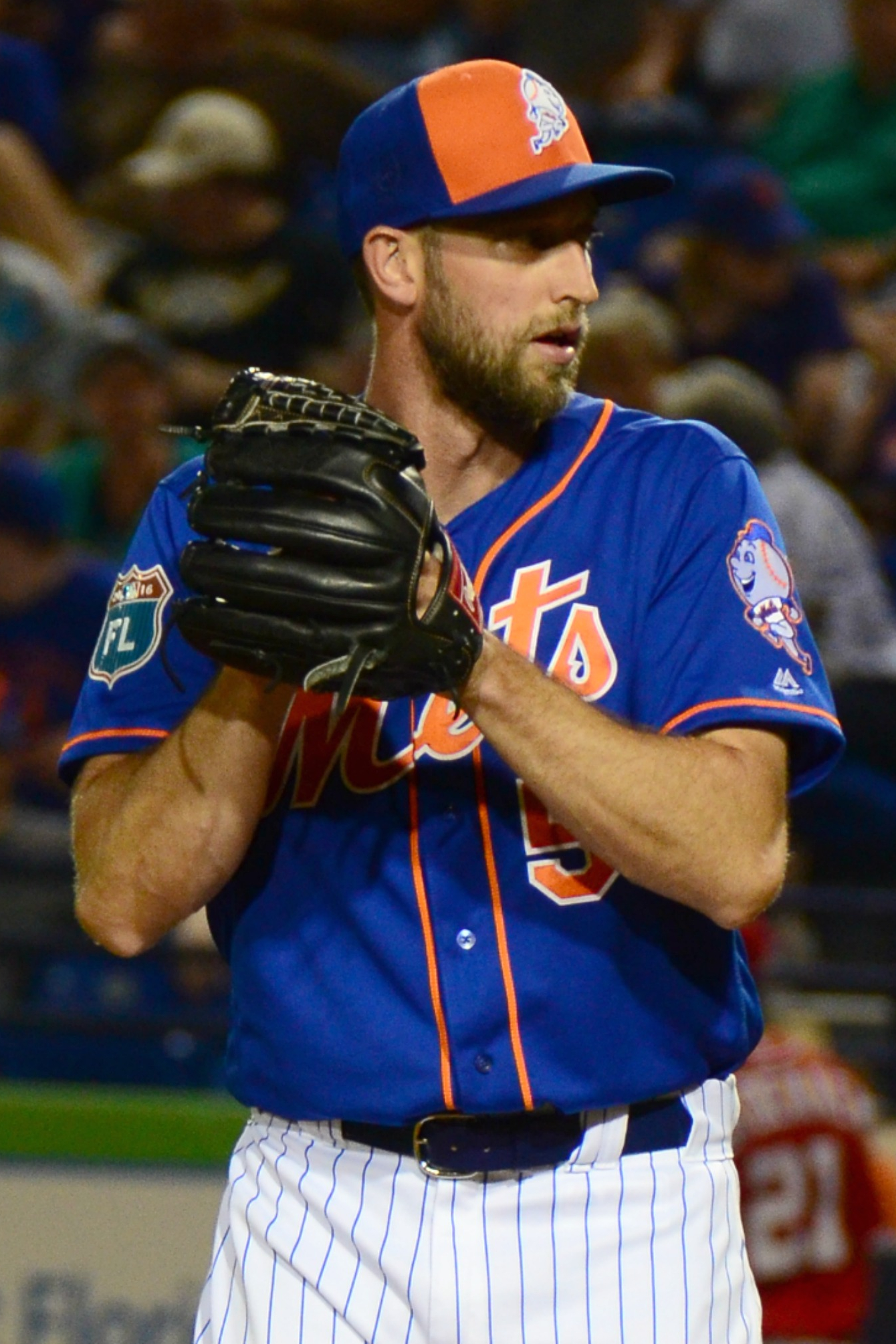 Jim Henderson